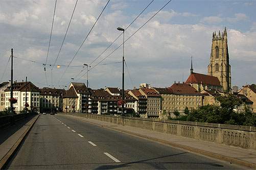 Fribourg / Freiburg: auf der Zähringenbrücke